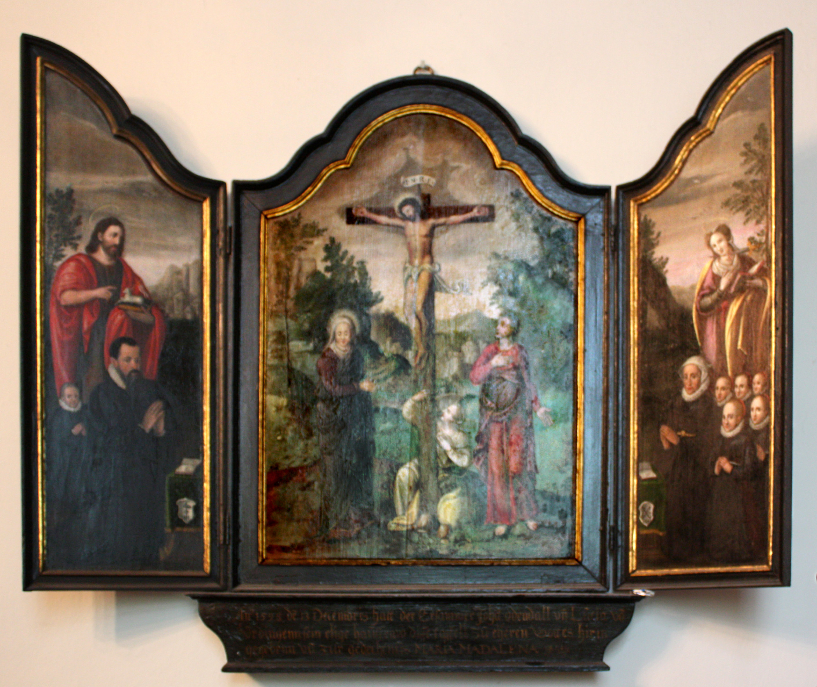 St. Maria Nagdalena Köln. Stifterbild 1593, heute in der Sakristei der Kirche St. Severin Köln